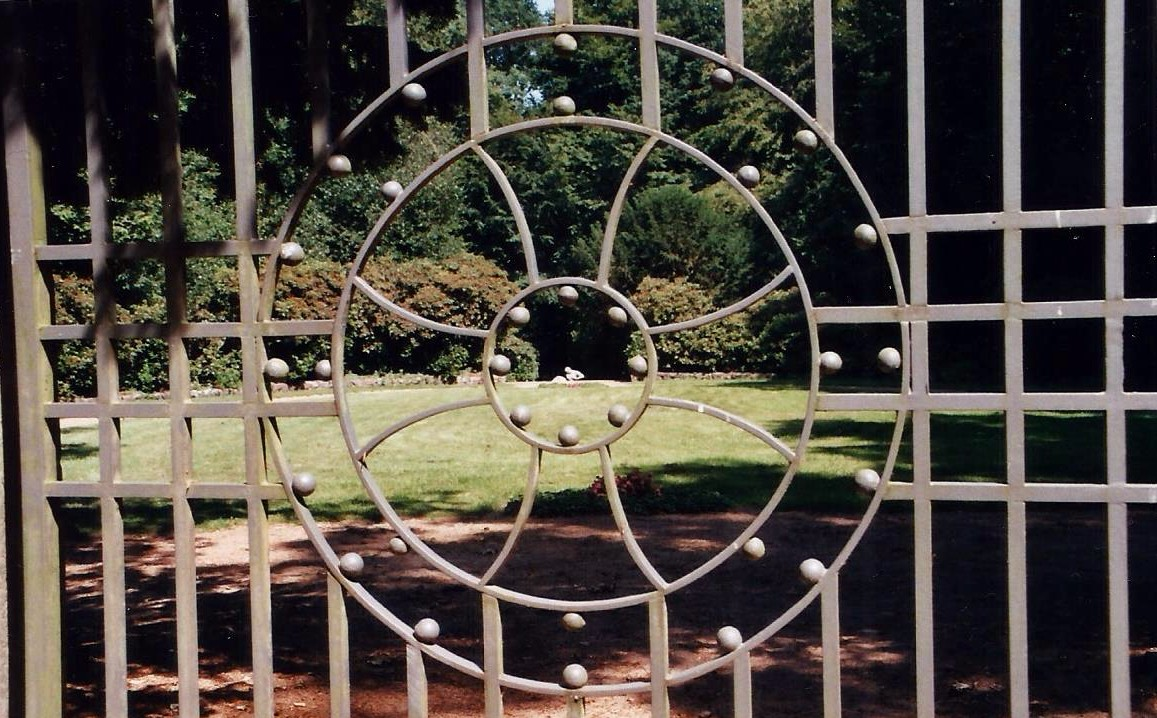 Auf dem Lübeckischen Ehrenfriedhof sind im Zentrum der Pforten des Hauptportals und des Portals zum darauf befindlichen Gräberfeld Hanseatenkreuze angedeutet. Im Kreuz befindet sich Fritz Behns Sterbender Krieger.